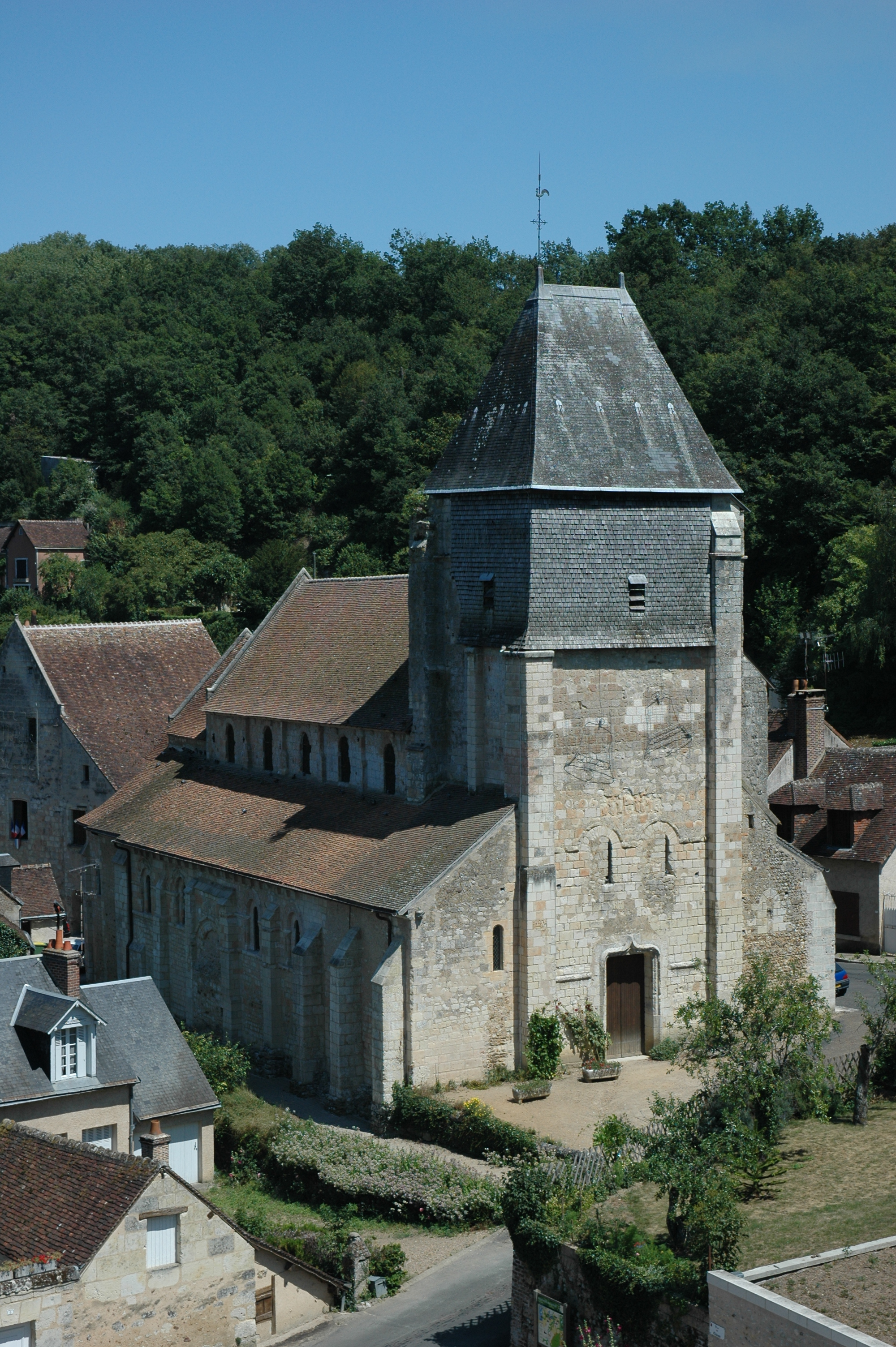 France Loir-et-Cher Lavardin L'Eglise Saint-Genest Photographie prise par GIRAUD Patrick